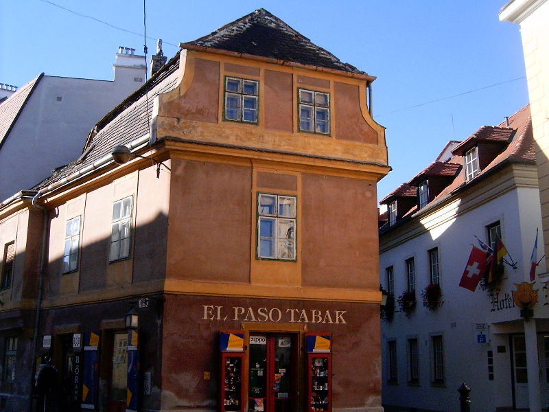 A győri Probst-ház, saját kép